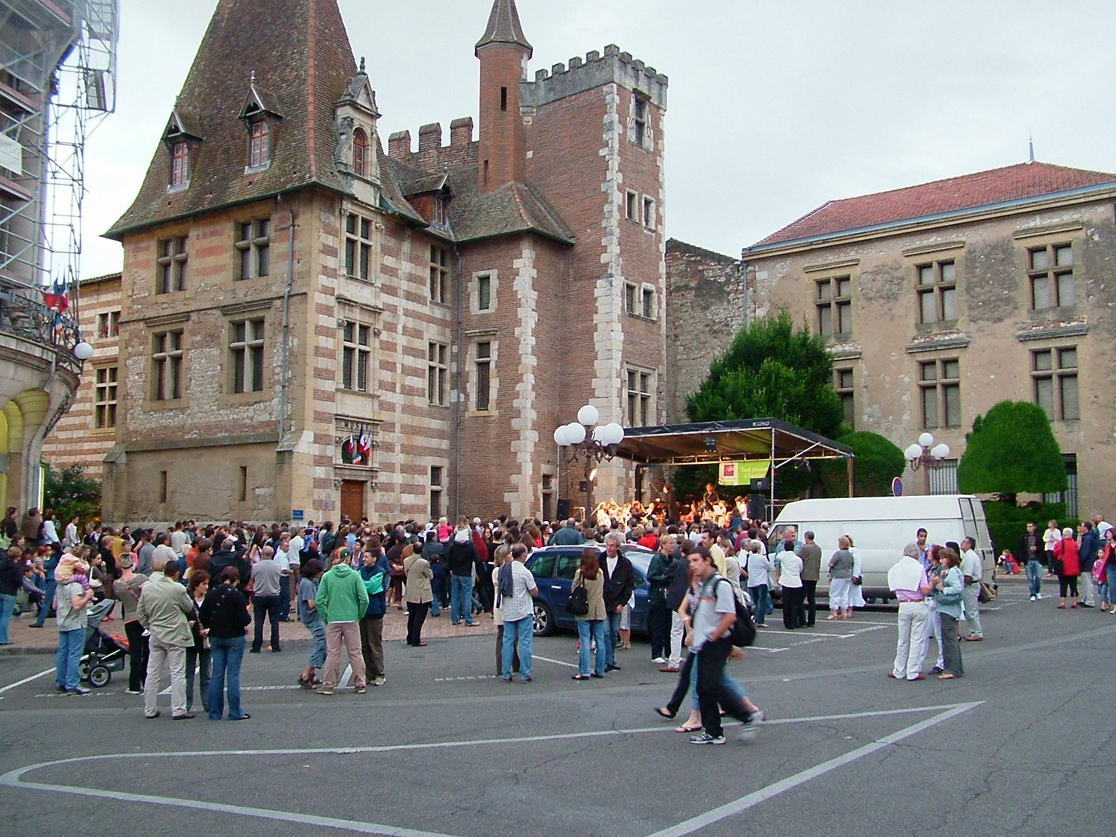 France, Lot-et-Garonne, Agen, fête de la musique devant le musée des Beaux-Arts .